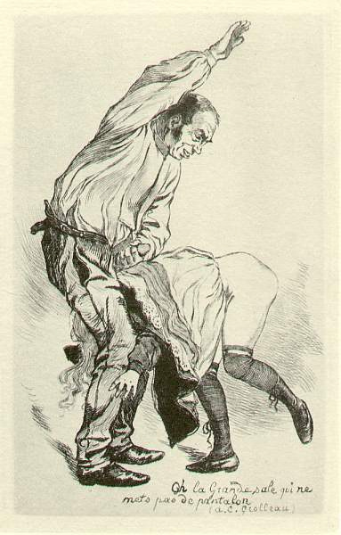 Oh la grande sale qui ne mets pas de pantalon Dessins de Martin van Maele. Illustration de La Grande Danse macabre des vifs, 1905.